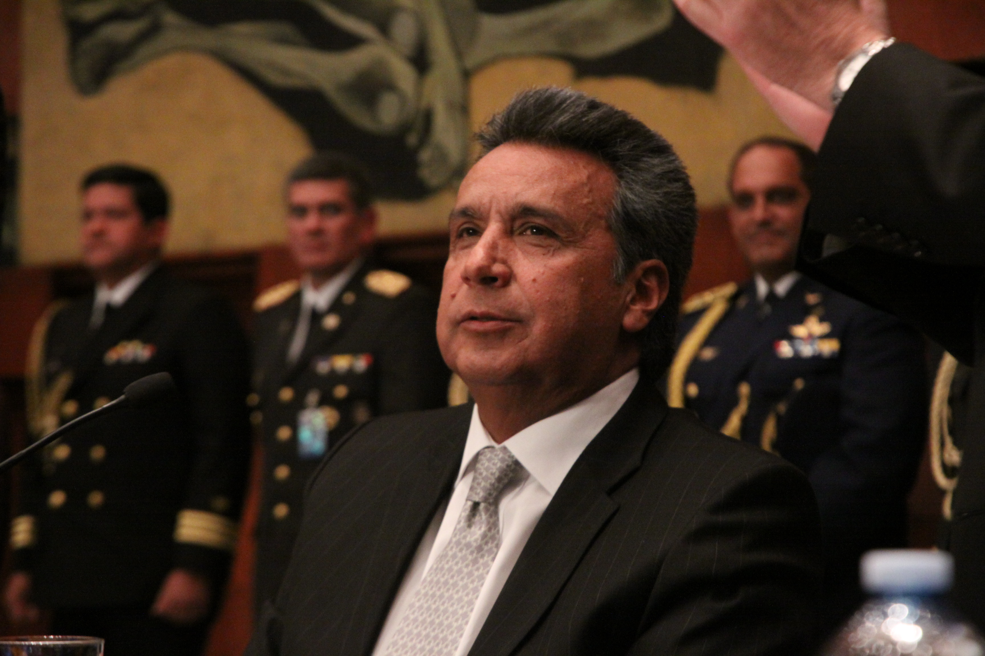 Informe a la nación del presidente de la República, Rafael Correa Delgado (116) Foto: Hugo Ortiz Ron / Asamblea Nacional